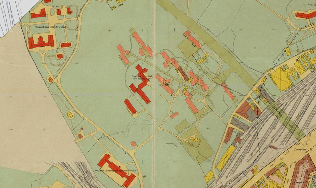 Området för dagens "Campus Solna" (när Karolinska institutet började etablera sig här)